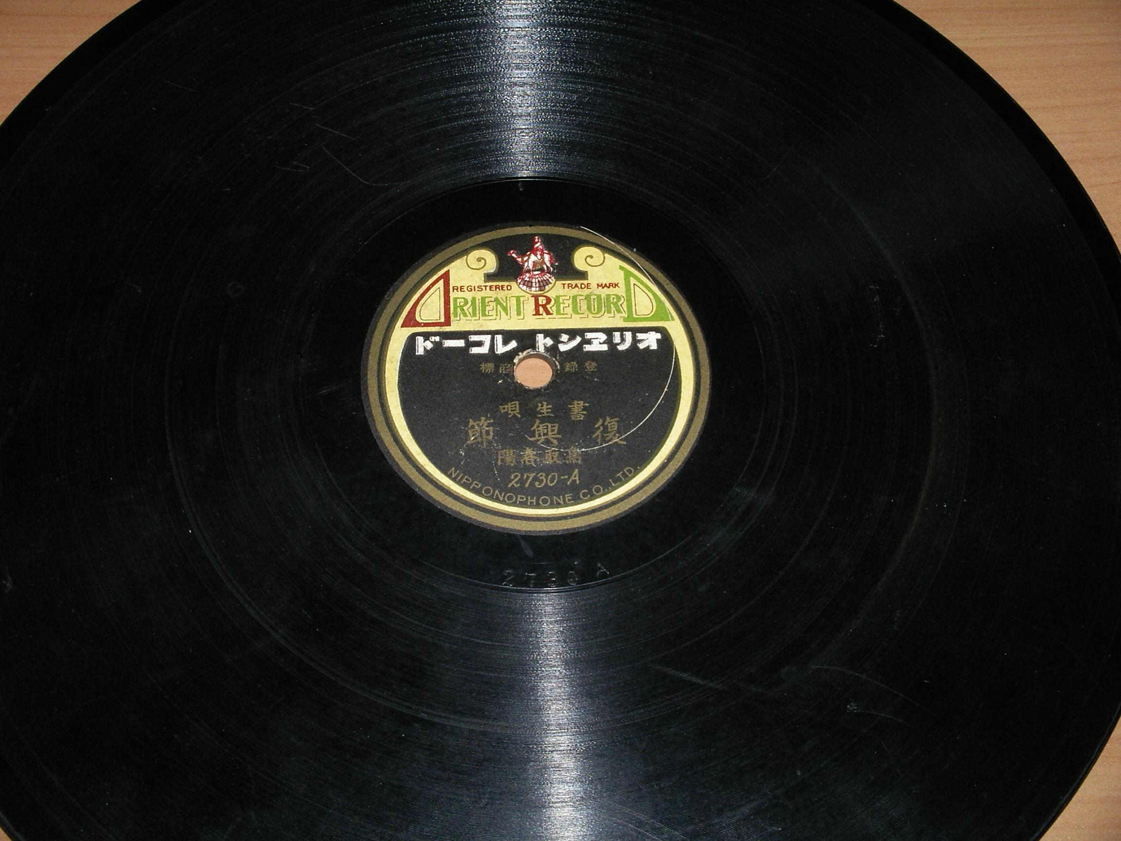 本人所有のレコード盤を撮影